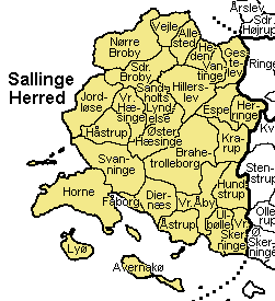 Sallinge Herred Svendborg Amt, Denmark. Map by Svend-Erik Christiansen, edited by user:Nico-dk .